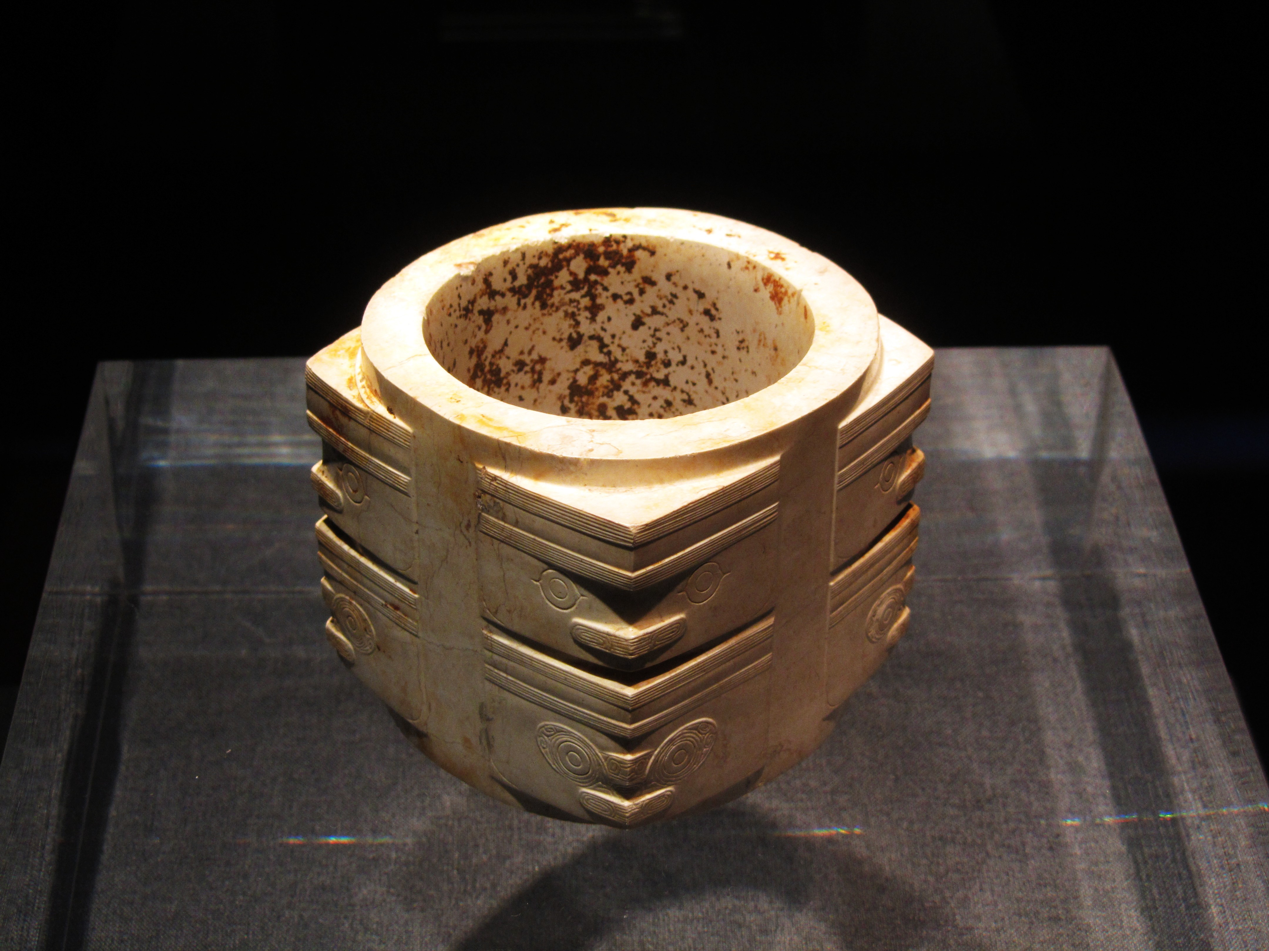 玉琮，浙江余杭瑶山遗址出土，良渚博物院藏。